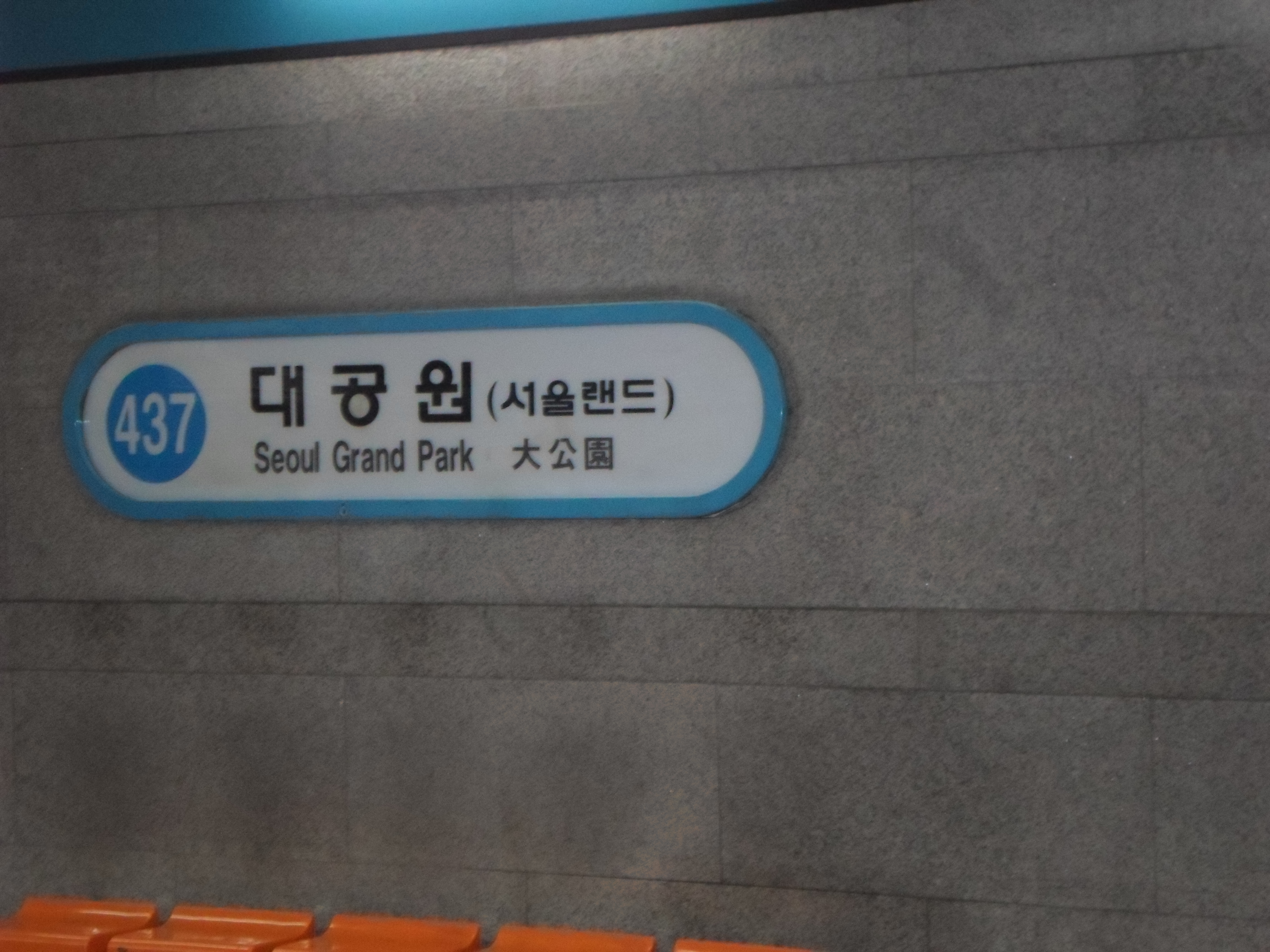 대공원역 역명판